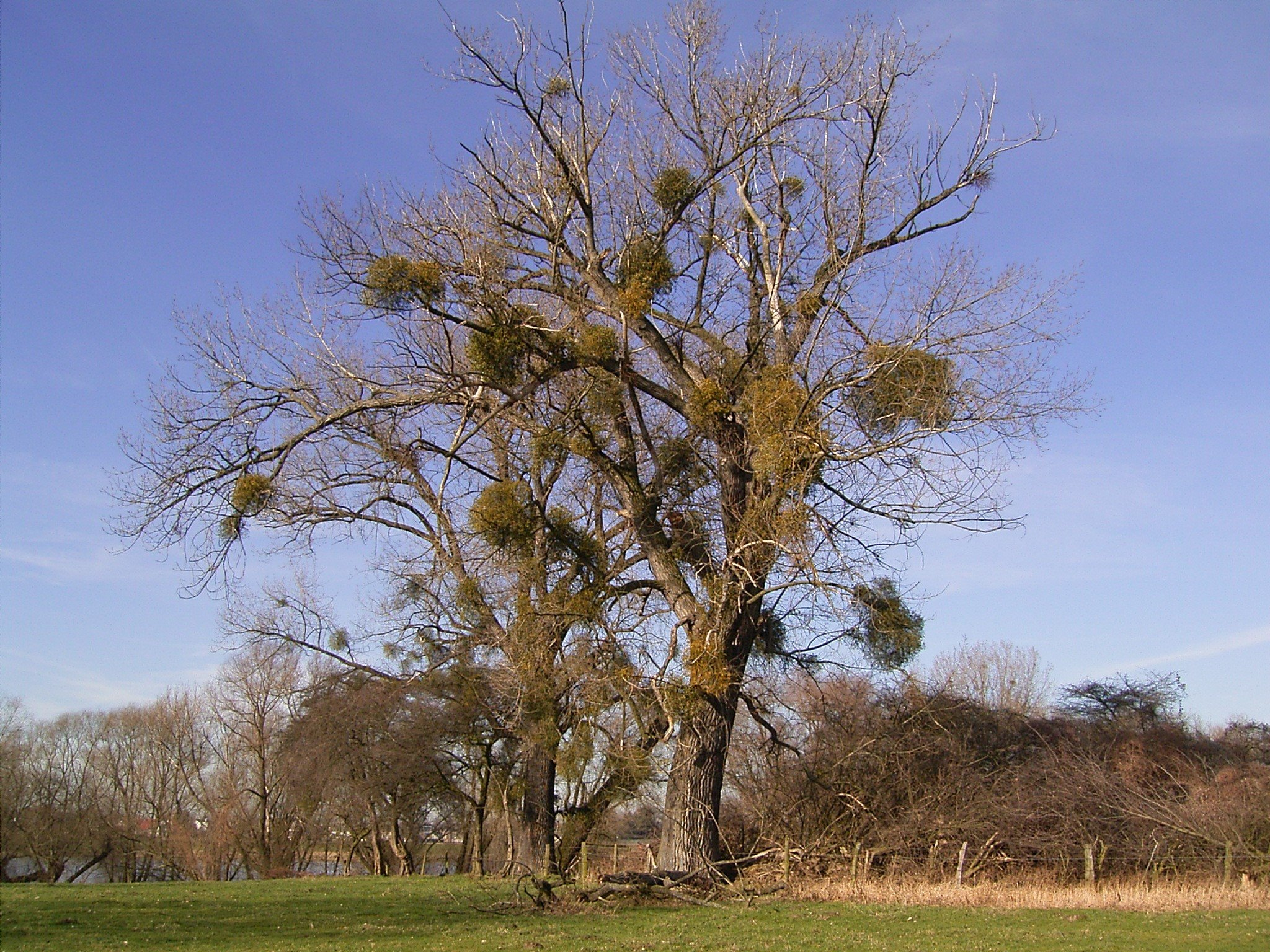 “Viscum album” growing in Düsseldorf-Himmelgeist